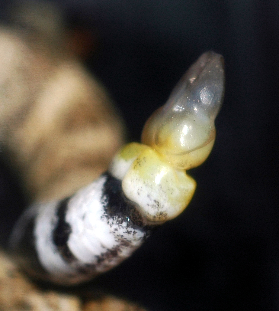 Small button rattle on juvenile rattlesnake.